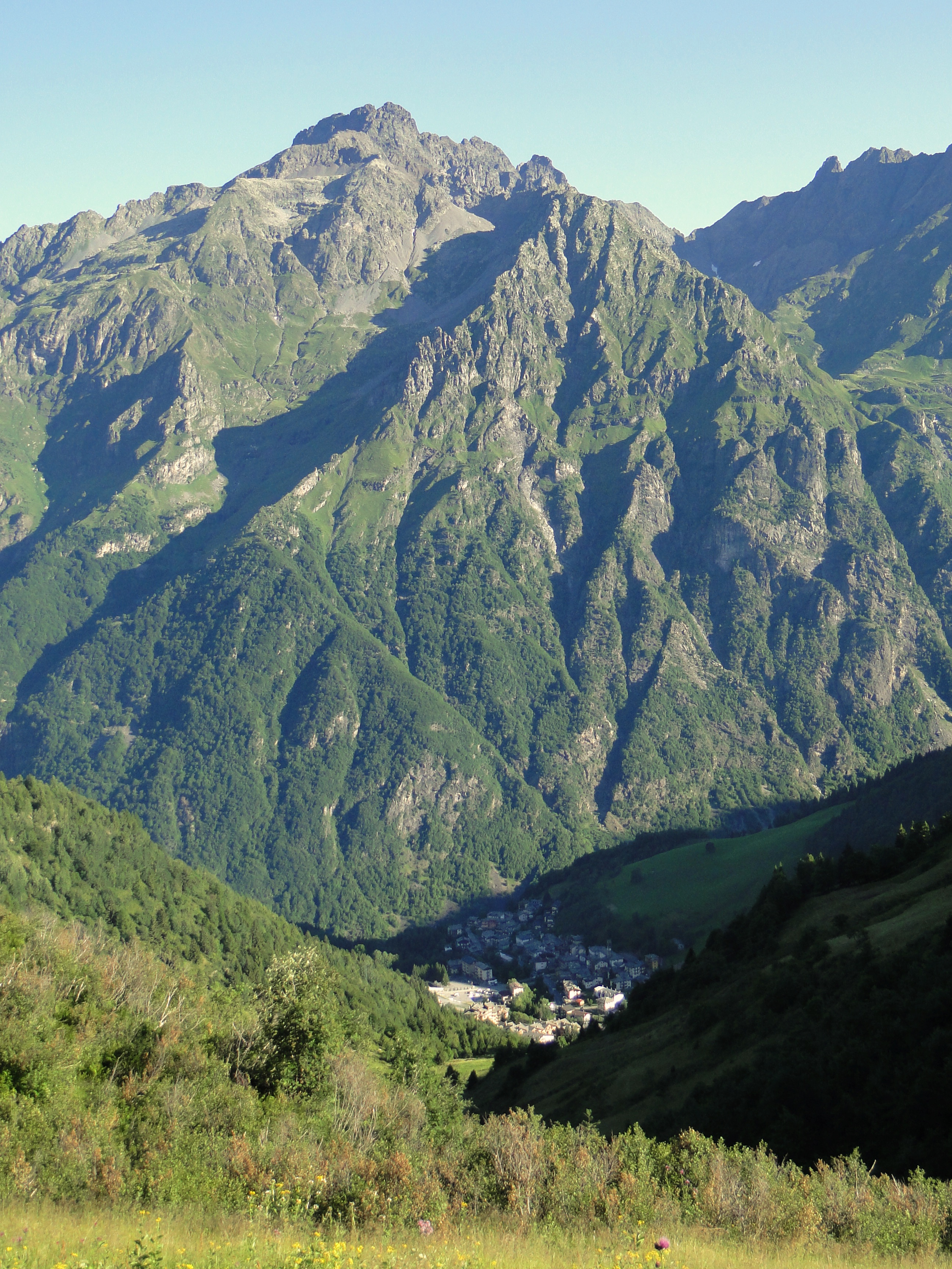 Lizzola (fraz. di Valbondione) con pizzo Redorta. Prealpi Orobie, valle seriana (Bergamo)